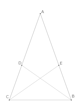 Steiner–Lehmus theorem